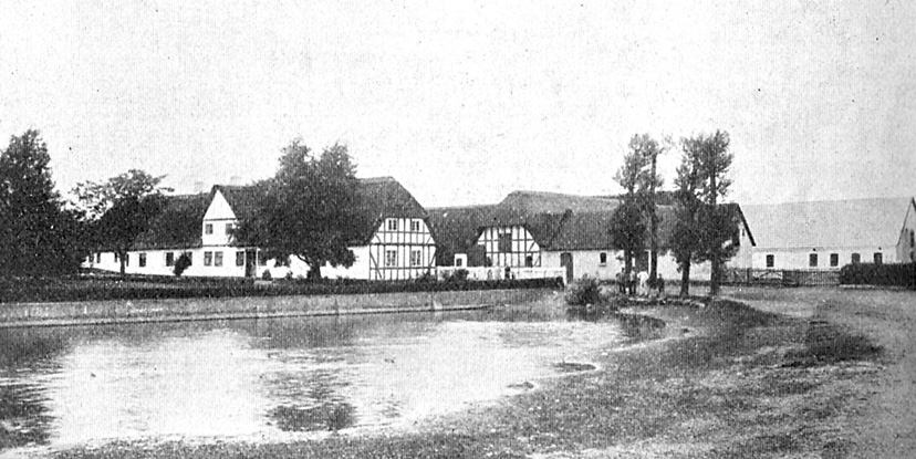 Barløsegaard er en lille hovedgård, som går tilbage til middelalderen. Gården ligger i Barløse Sogn, Båg Herred, Odense Amt, Assens Kommune. Hovedbygningen er opført i 1819.